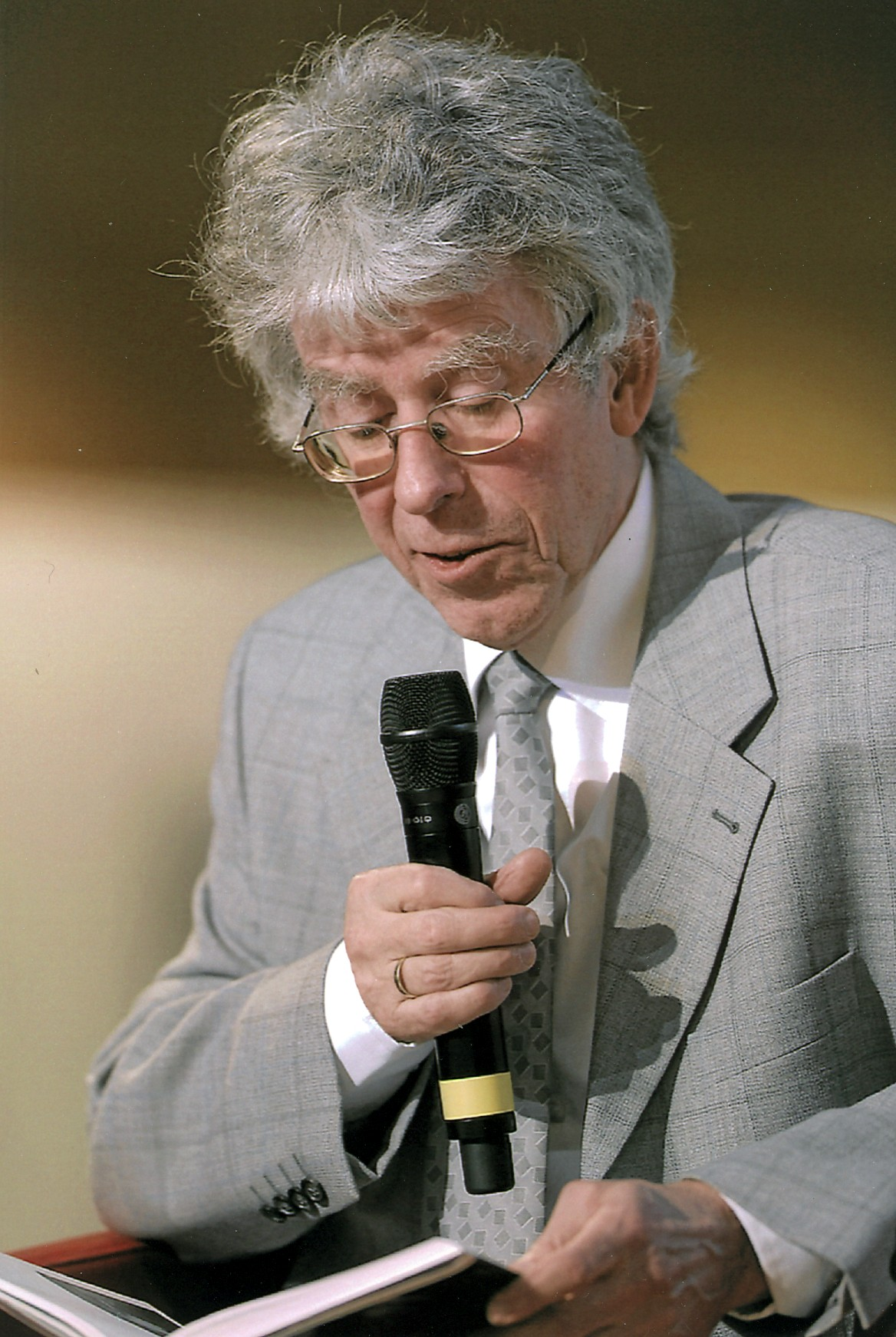 Jörg Hildebrandt, März 2008